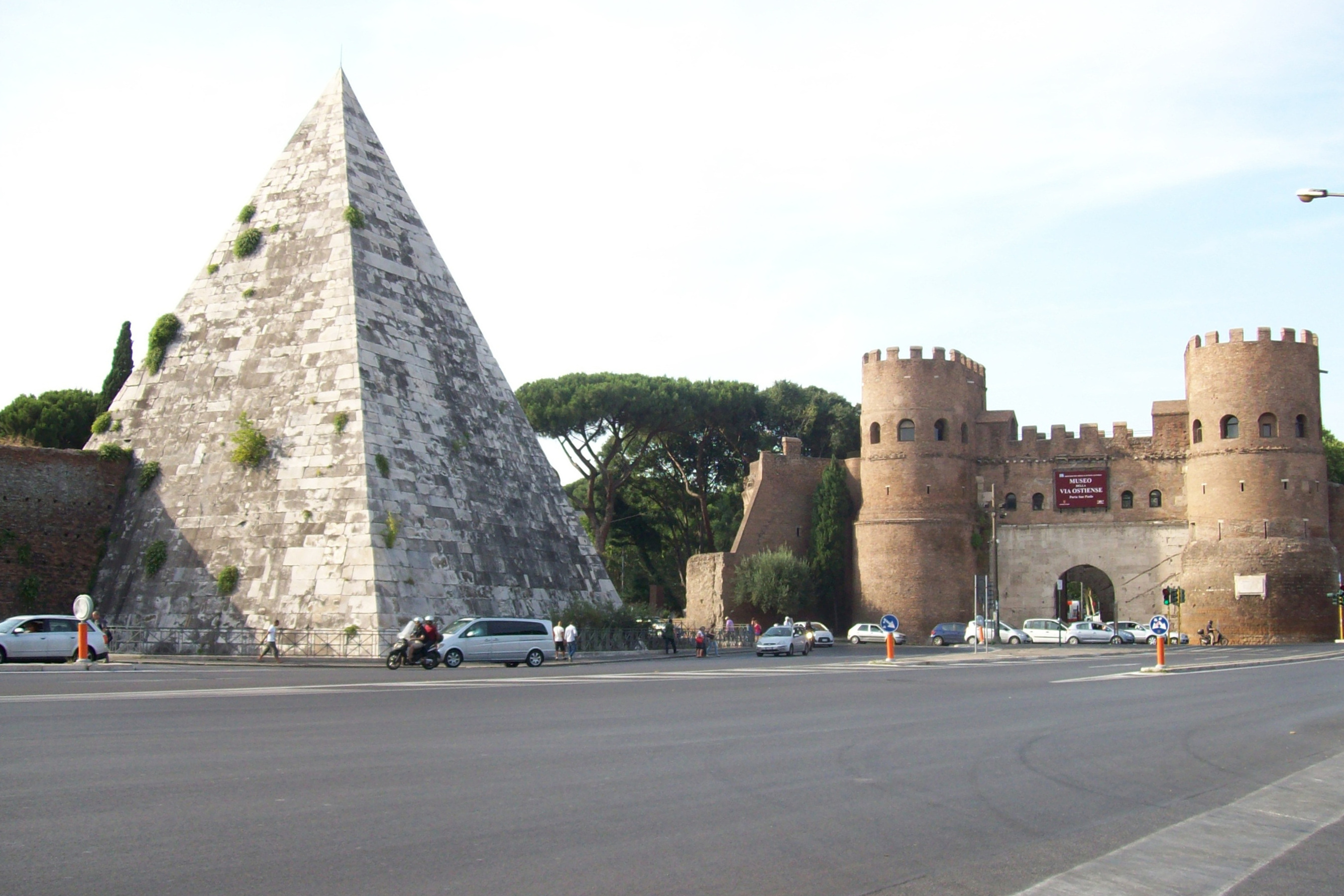 Piazzale Ostiense in Rome; on the left the Pyramid of Caius Cestius, on the right Porta San Paolo it=Una vista di piazzale Ostiense a Roma; sulla sinistra la piramide di Caio Cestio, sulla destra Porta San Paolo